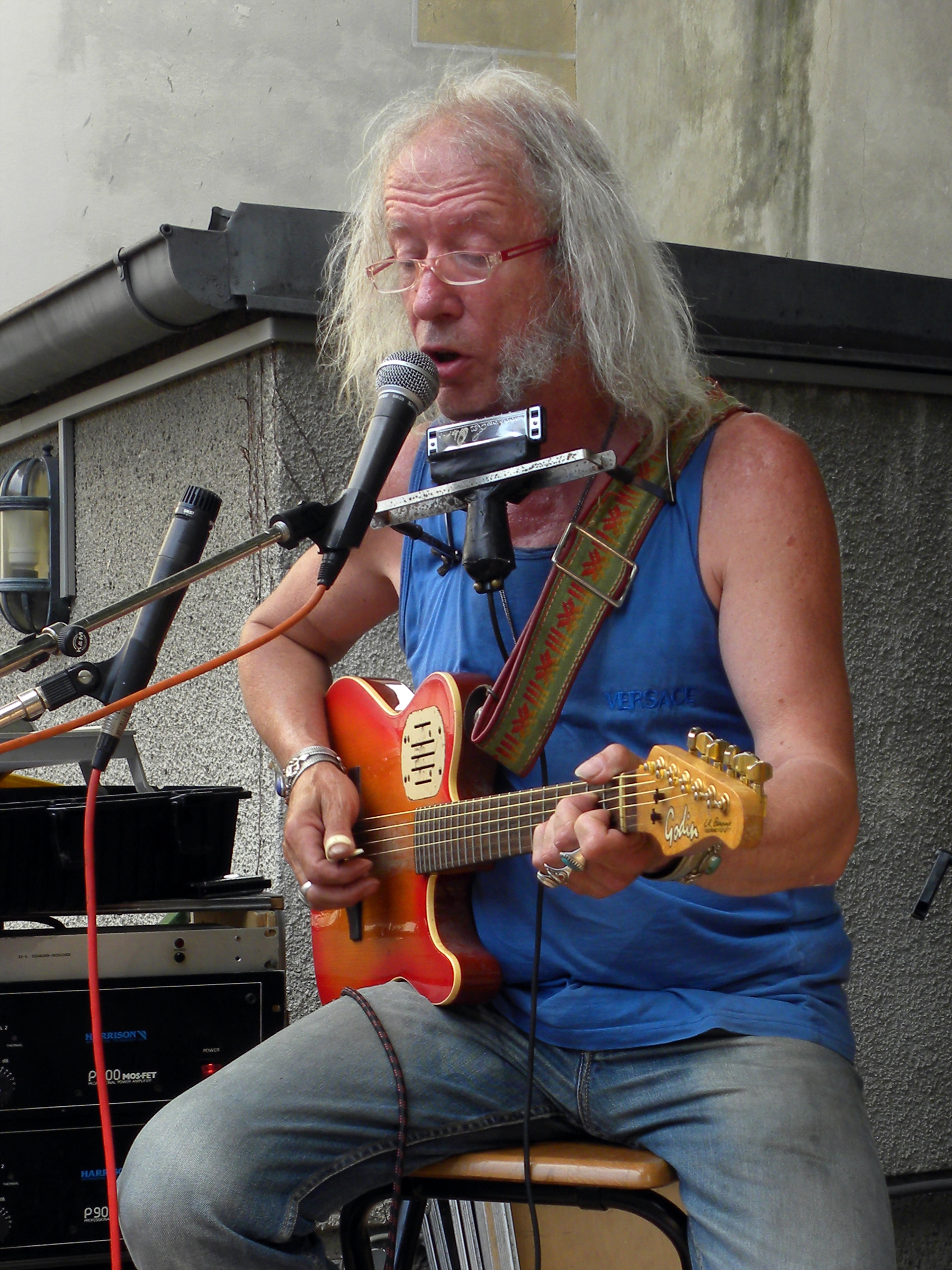 Bluespumpm spielten am 17. Juni 2012 beim Nußdorfer Grätzlfest.